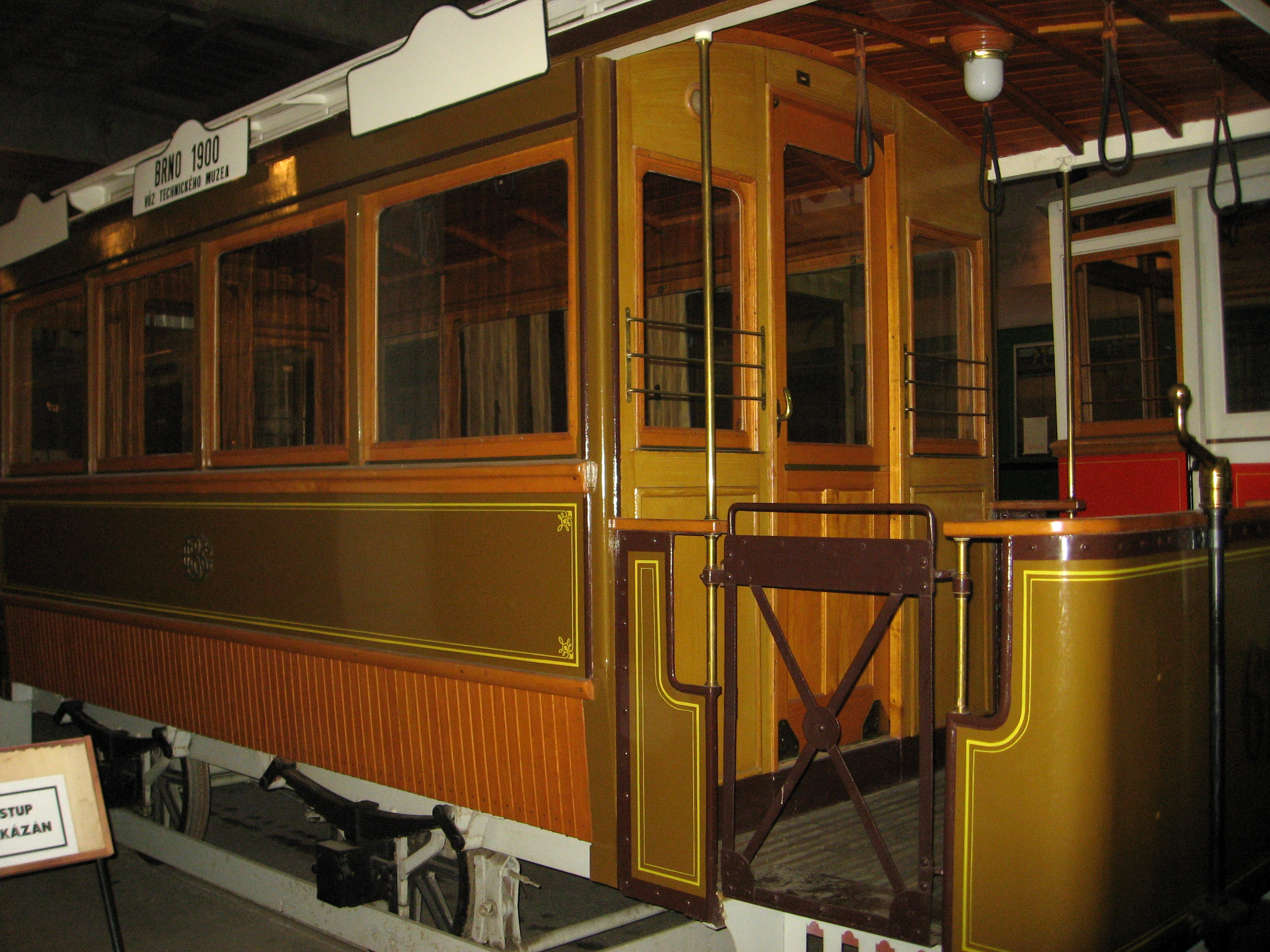 Brněnský vlečný vůz ev. č. 61, rok výroby 1899, výrobce Graz – exponát Technického muzea v Brně, depozitář MHD v Líšni